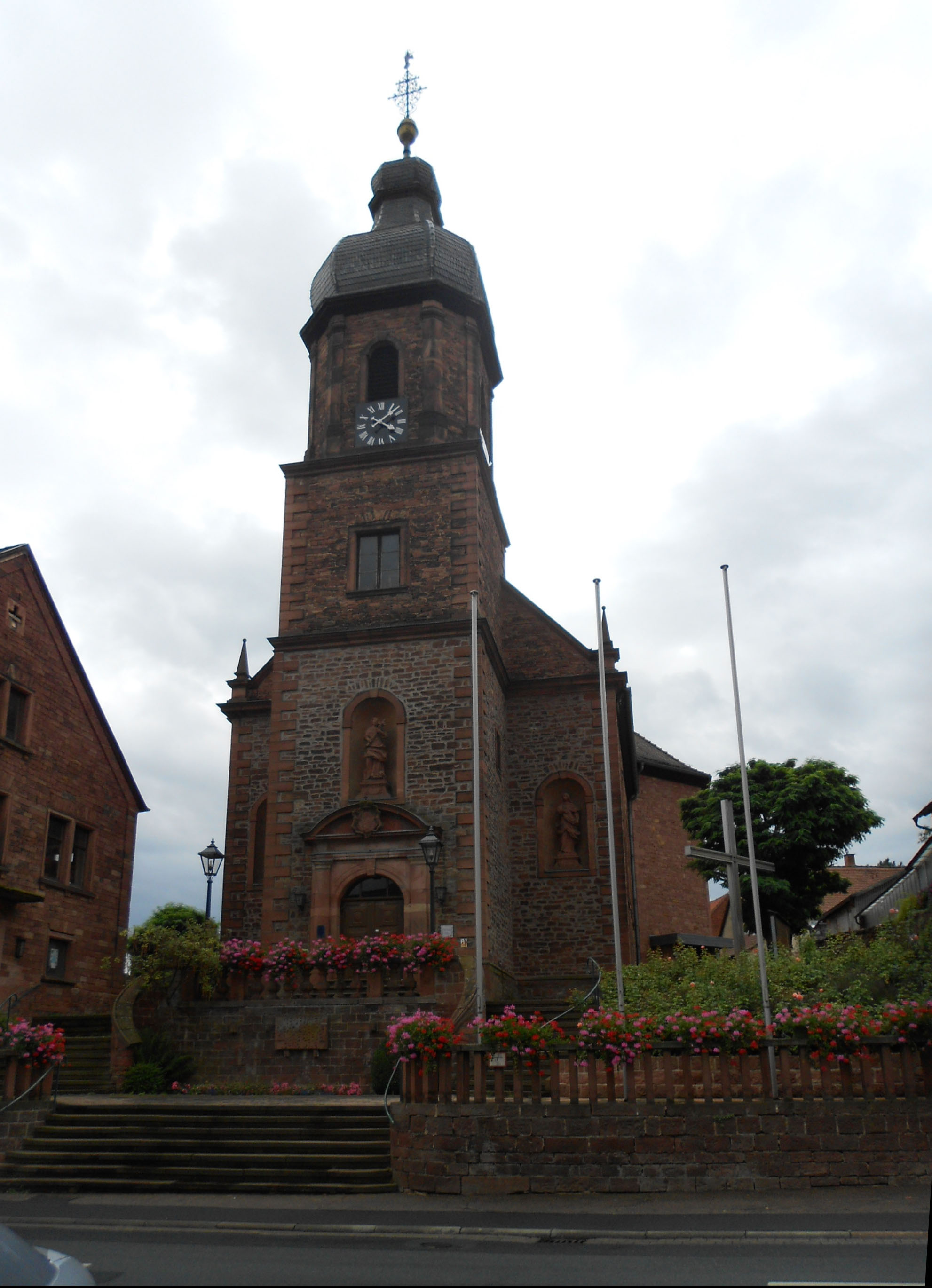 Katholische Pfarrkirche St. Maria Magdalena in Klingenberg am Main (Ortsteil Trennfurt), Trennfurter Straße 74, Akten Nr. D-6-76-134-78